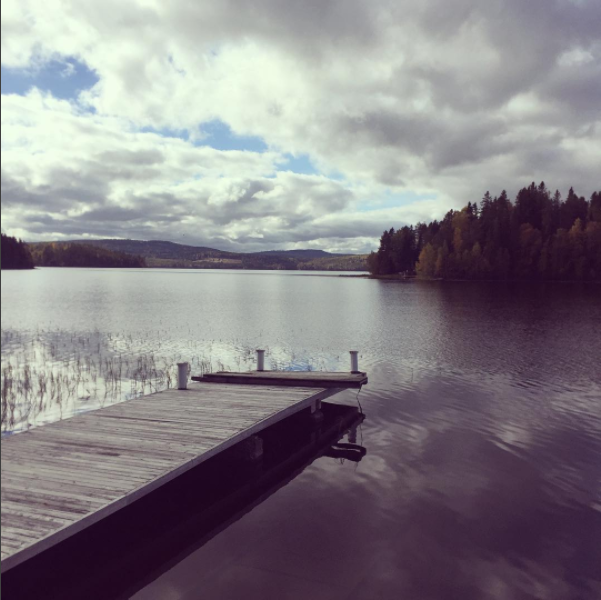 Utsikt över Bygdeträsket från sommarstugeområdet Högliden, september 2016.